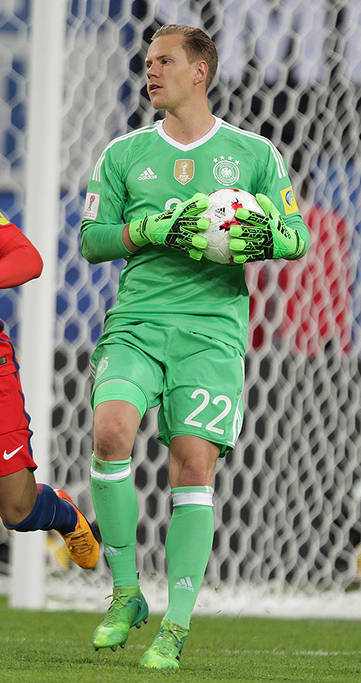 Чили - Германия